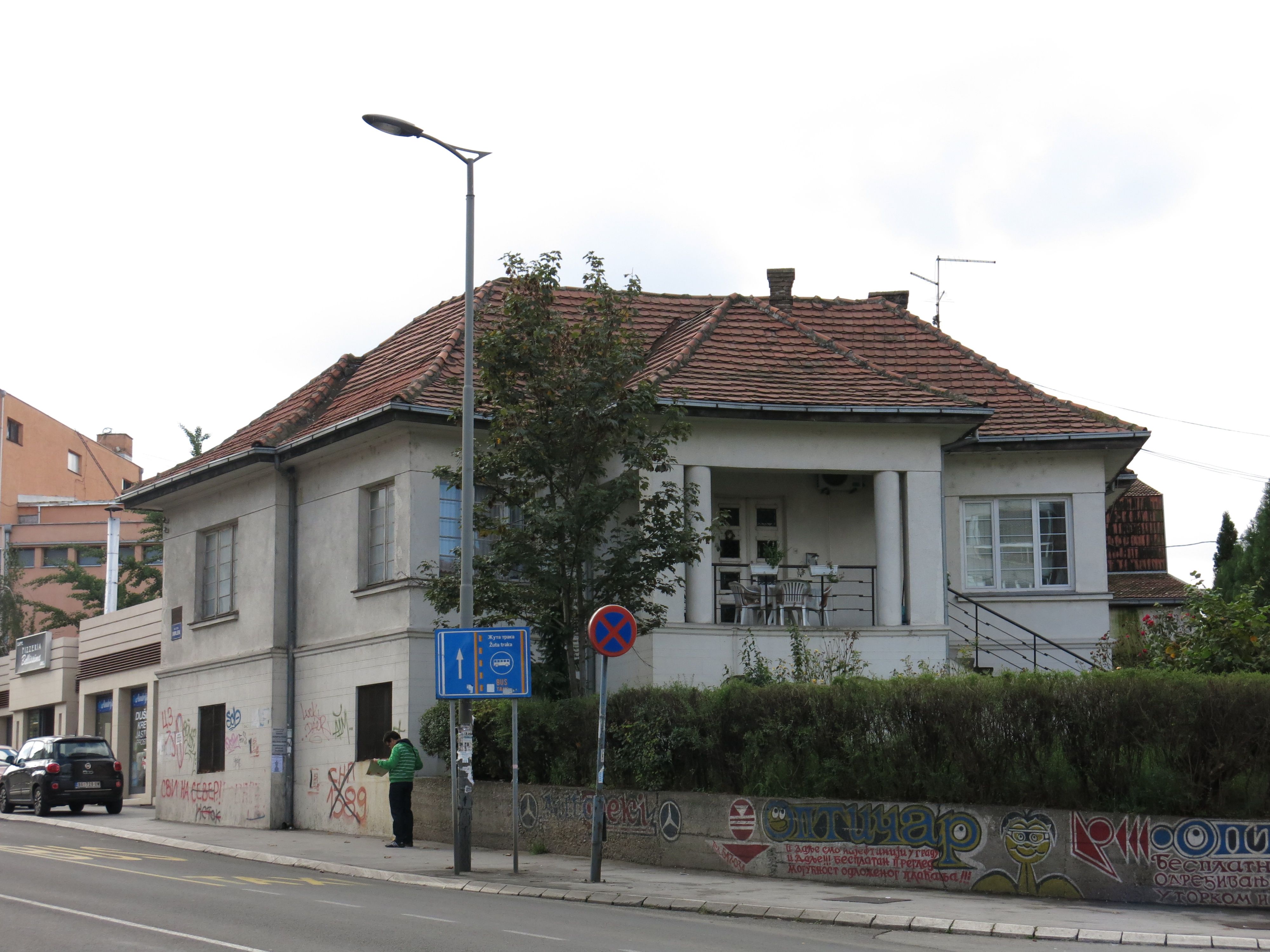 Зграда у Ул. Тургењевљевој 1